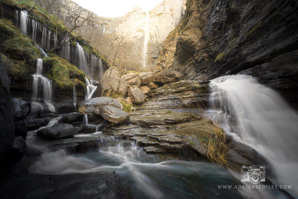 Fotografía del cañon de Delika a los pies del salto del Río Nervión en Orduña, realizada por Adrian Sediles Embi.